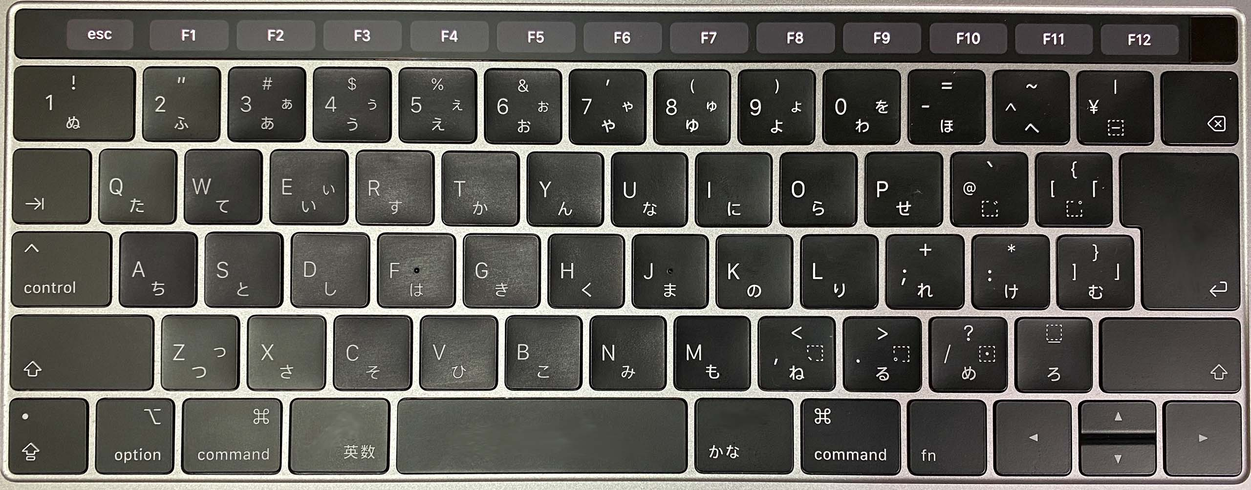 Macintoshに搭載するJISキーボード